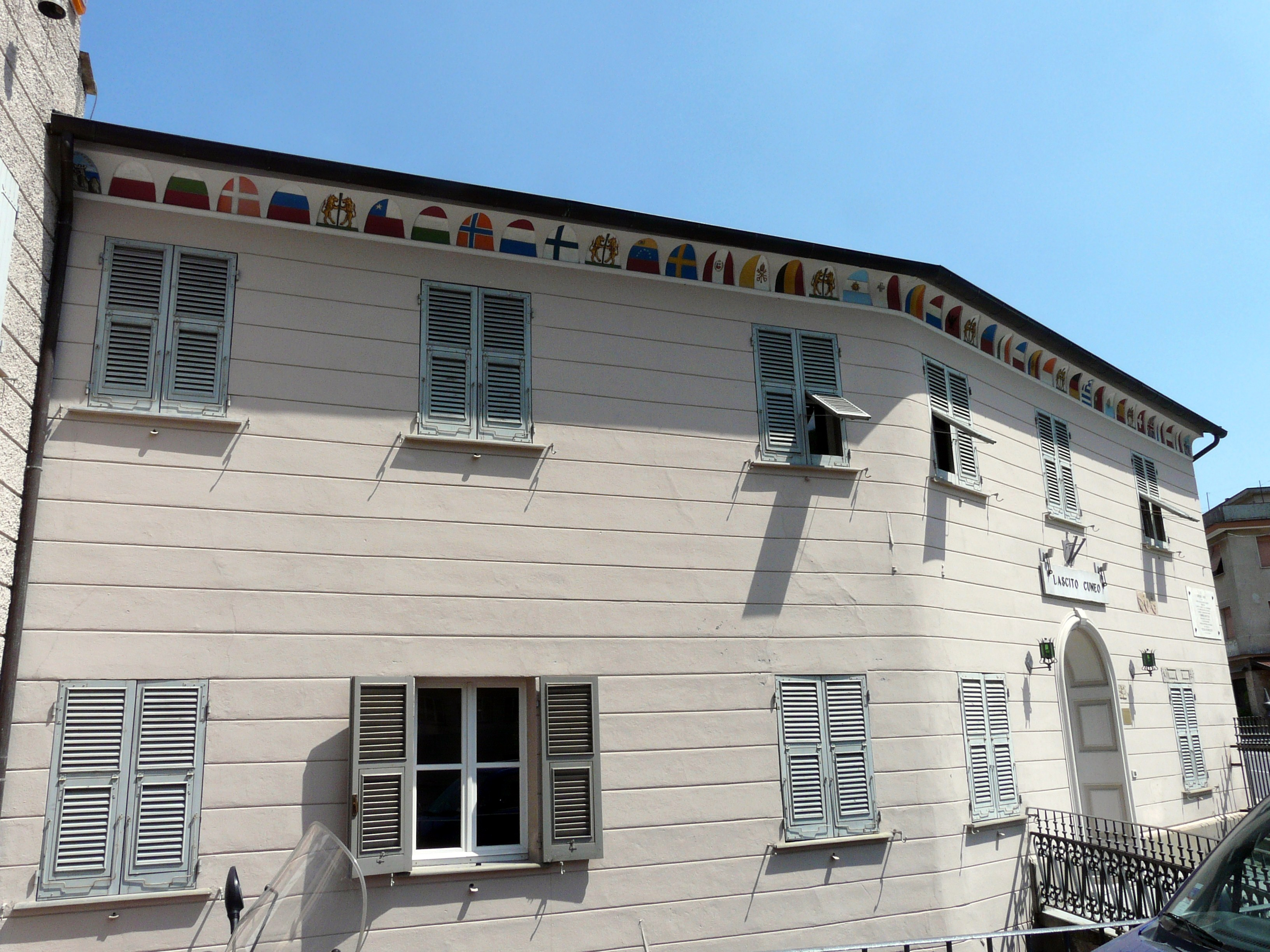 Il museo "Lascito Cuneo", San Colombano Certenoli, Liguria, Italia